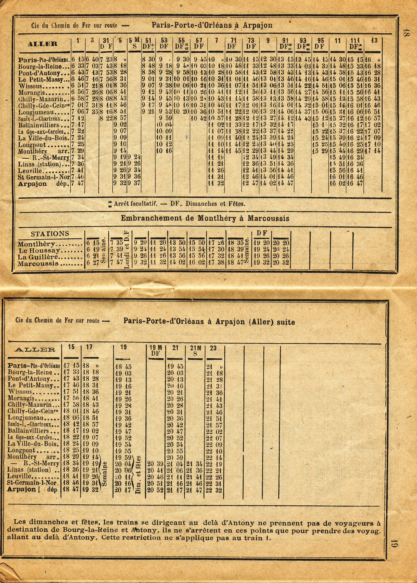 Indicateur des Chemins de fer - PLM-Orléans-Ceinture et Tramways de la région, offert par la Société Générale Imprimé à Corbeil Pages 18 et 19 : Paris-Porte d'Orléans - Arpajon